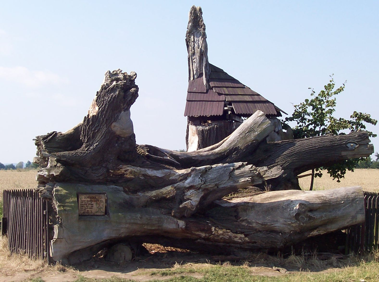 Semtinská lípa - torzo památného stromu, zničeného bouří v roce 2000, katastrální území Podkost, část obce Libošovice, okres Jičín